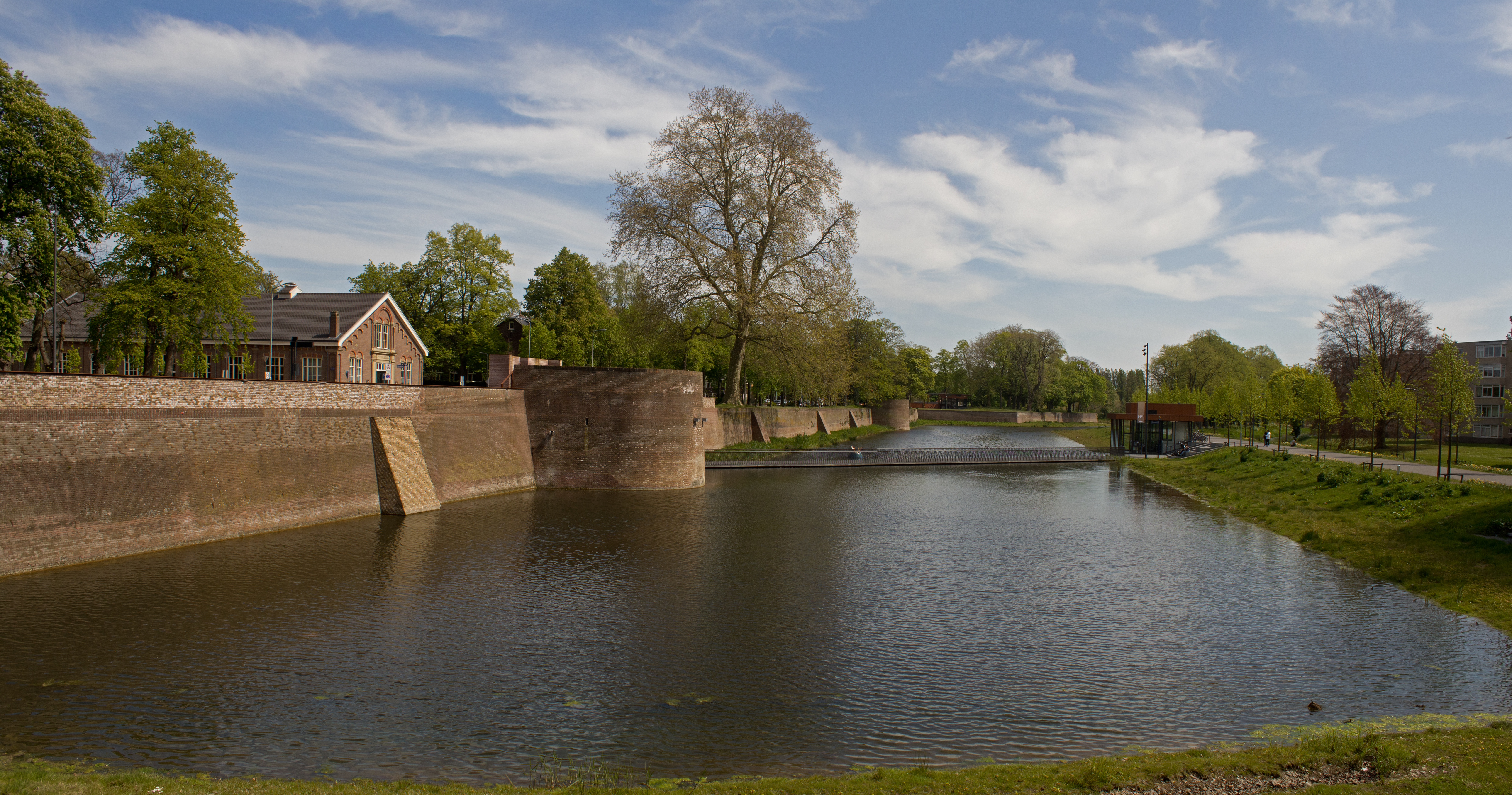 Stadsmuren van Den Bosch ter hoogte van het Zuiderpark.